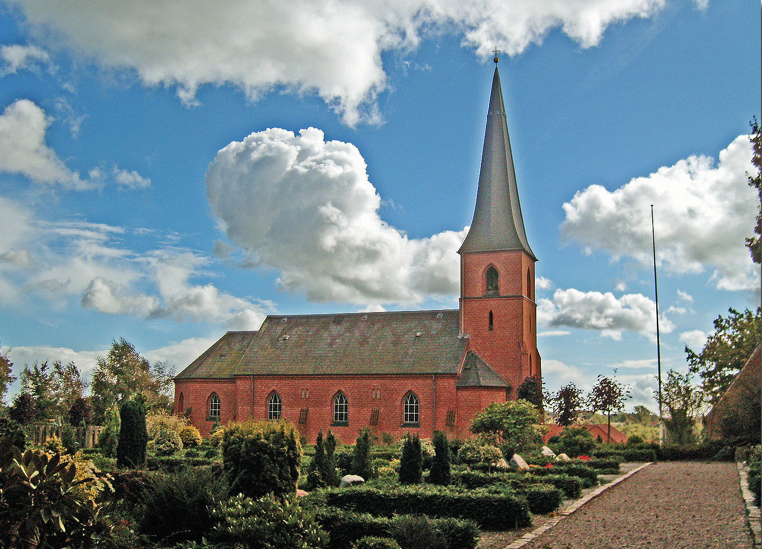 fra nord